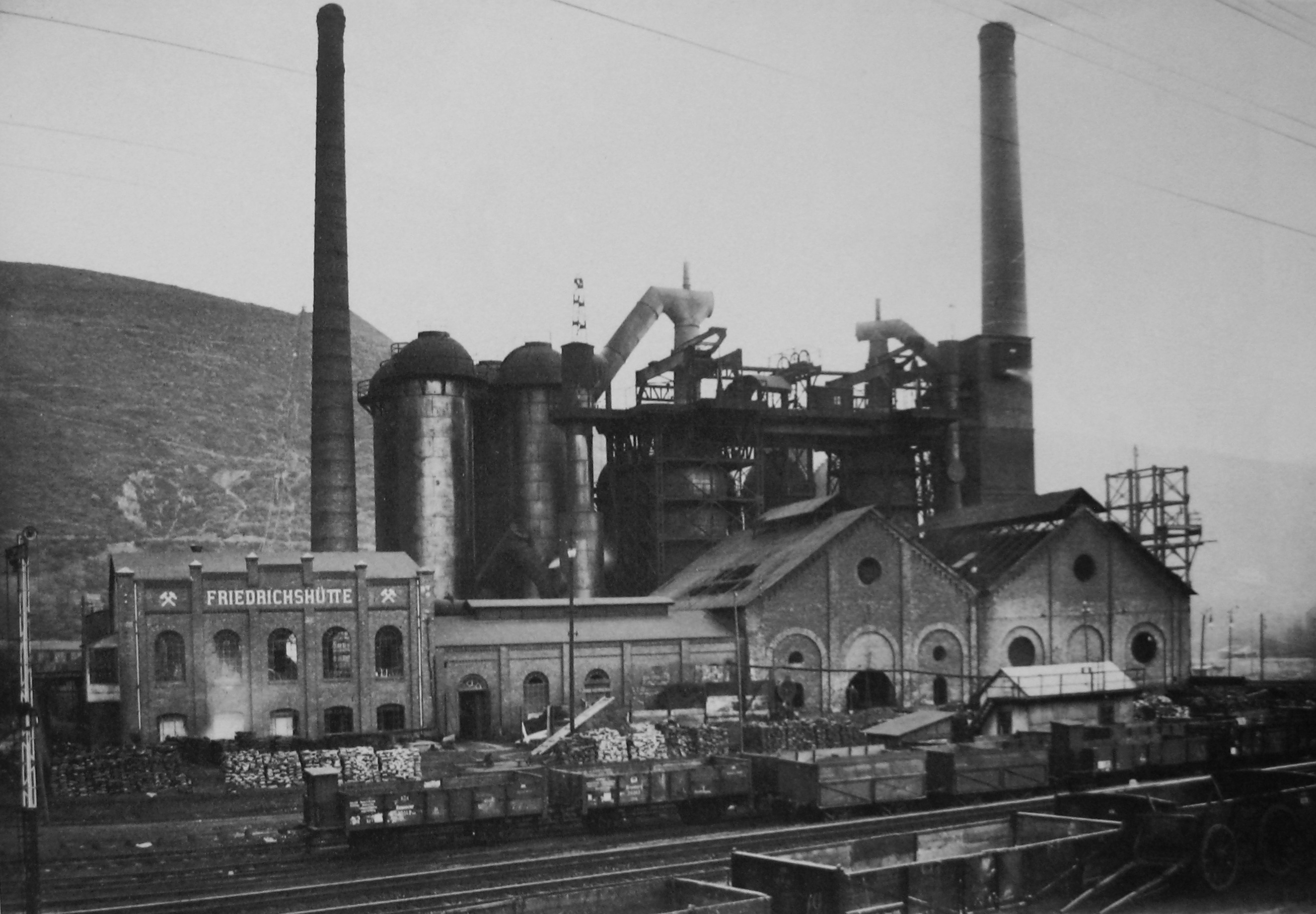 Die Friedrichshütte in Herdorf / Rheinland-Pfalz um 1915.